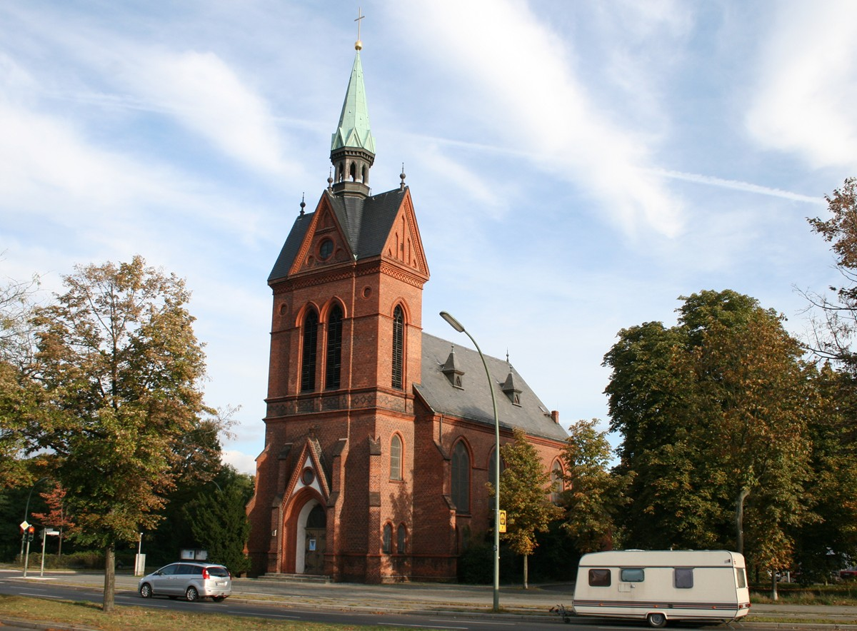 Berlin-Wilhelmstadt, Melanchthonkirche.